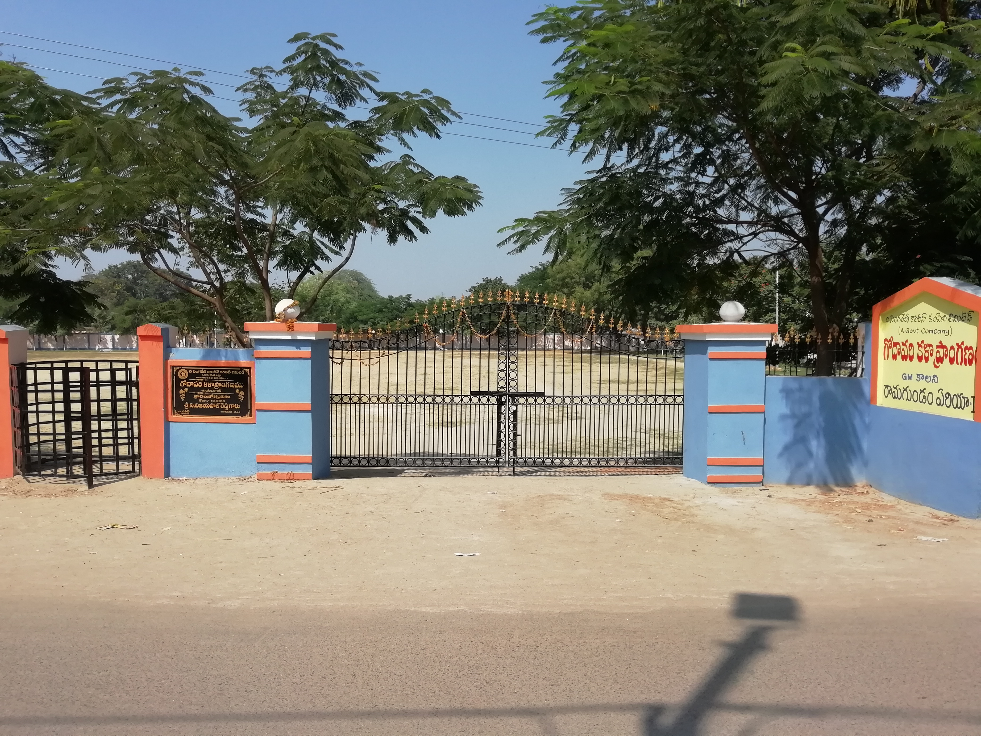 గోదావరి కళా ప్రాంగణం, రామగుండం మండలం లోని గోదావరిఖని పట్టణం , జియం కాలనిలో ఉంది.